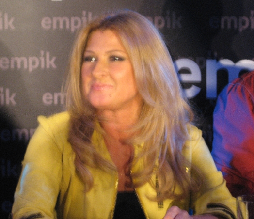 Zespół Bajm podpisuje swoją najnowszą płytę Ballady 2 w Salonie Empik Junior w Warszawie (7 kwietnia 2008).